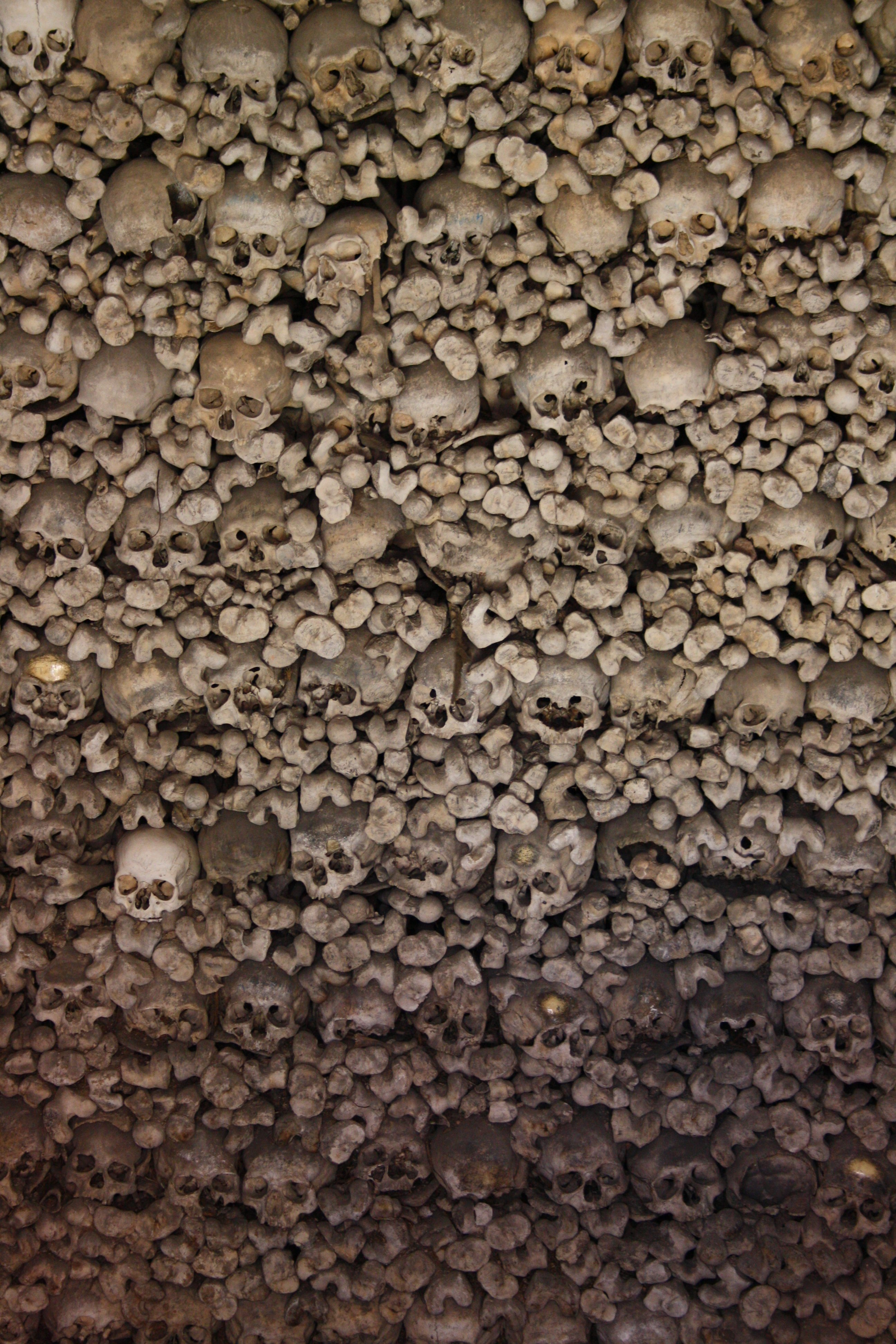 Katharinenkirche Oppenheim